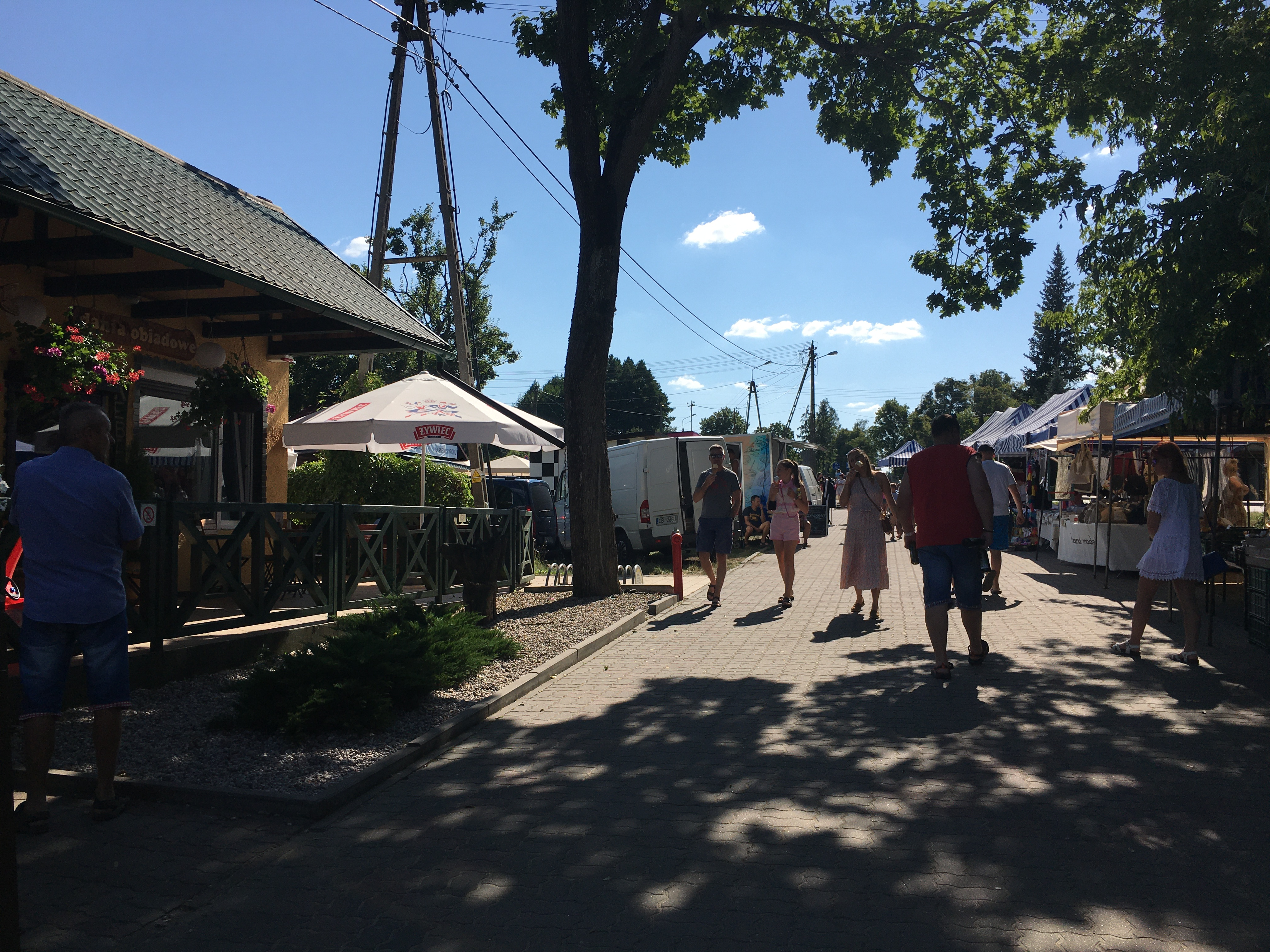 Tleń, stragany koło ul. Bydgoskiej.